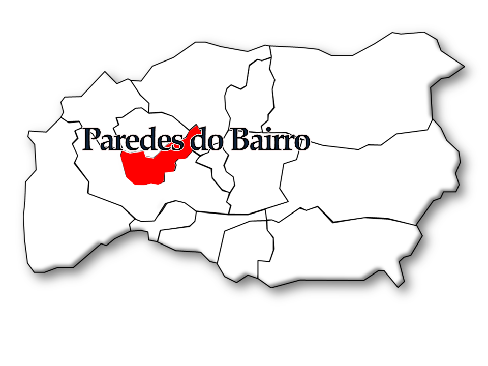 Freguesia